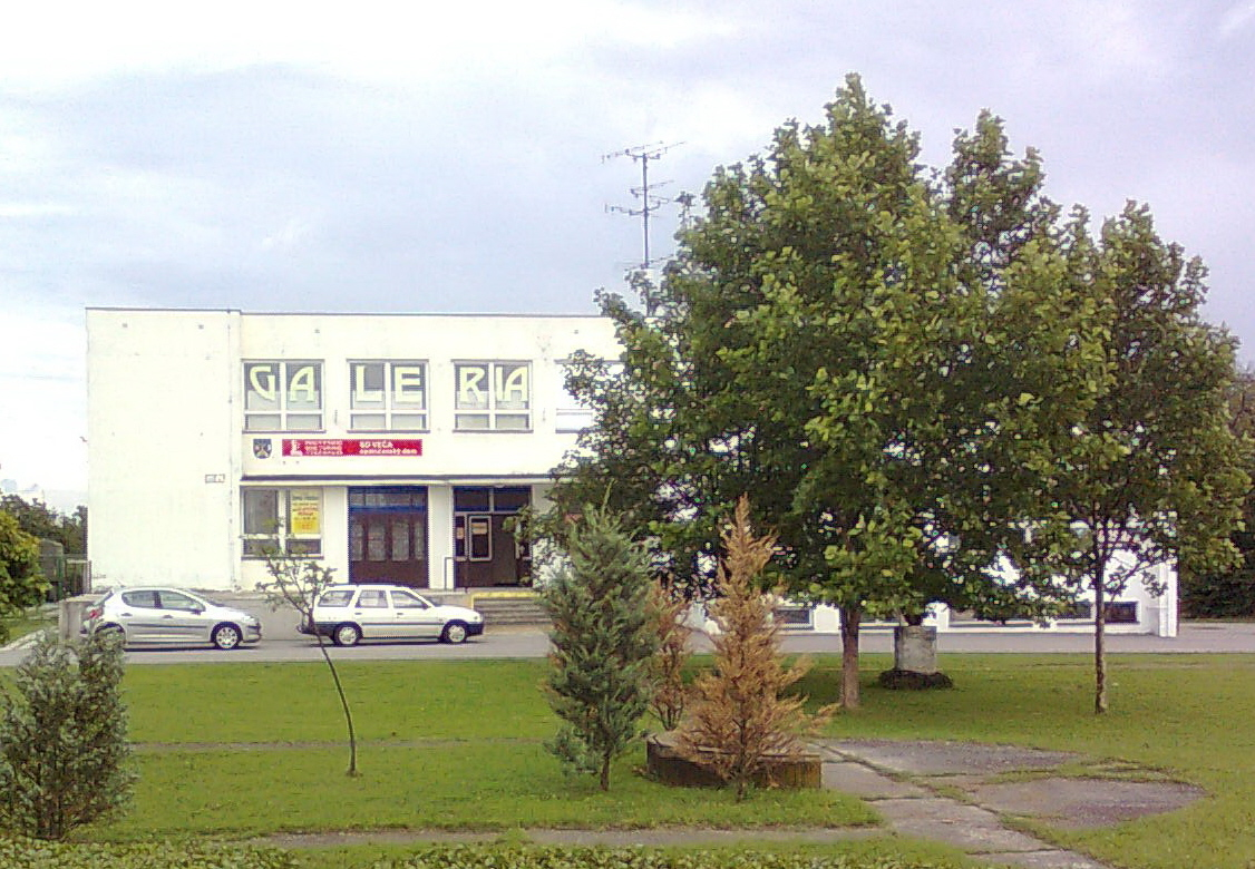 Spoločenský dom Veča,, Galéria